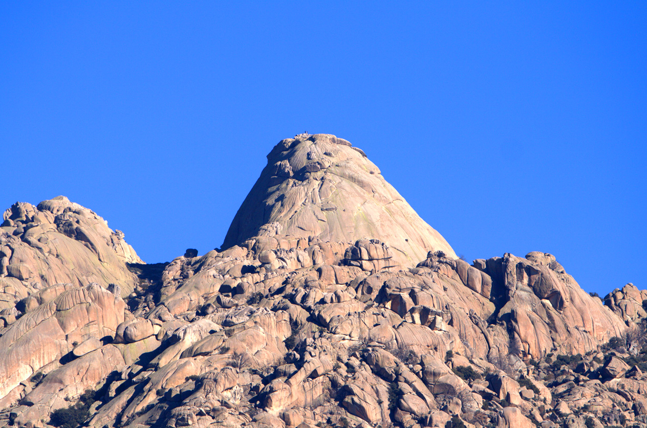 La teta de piedra